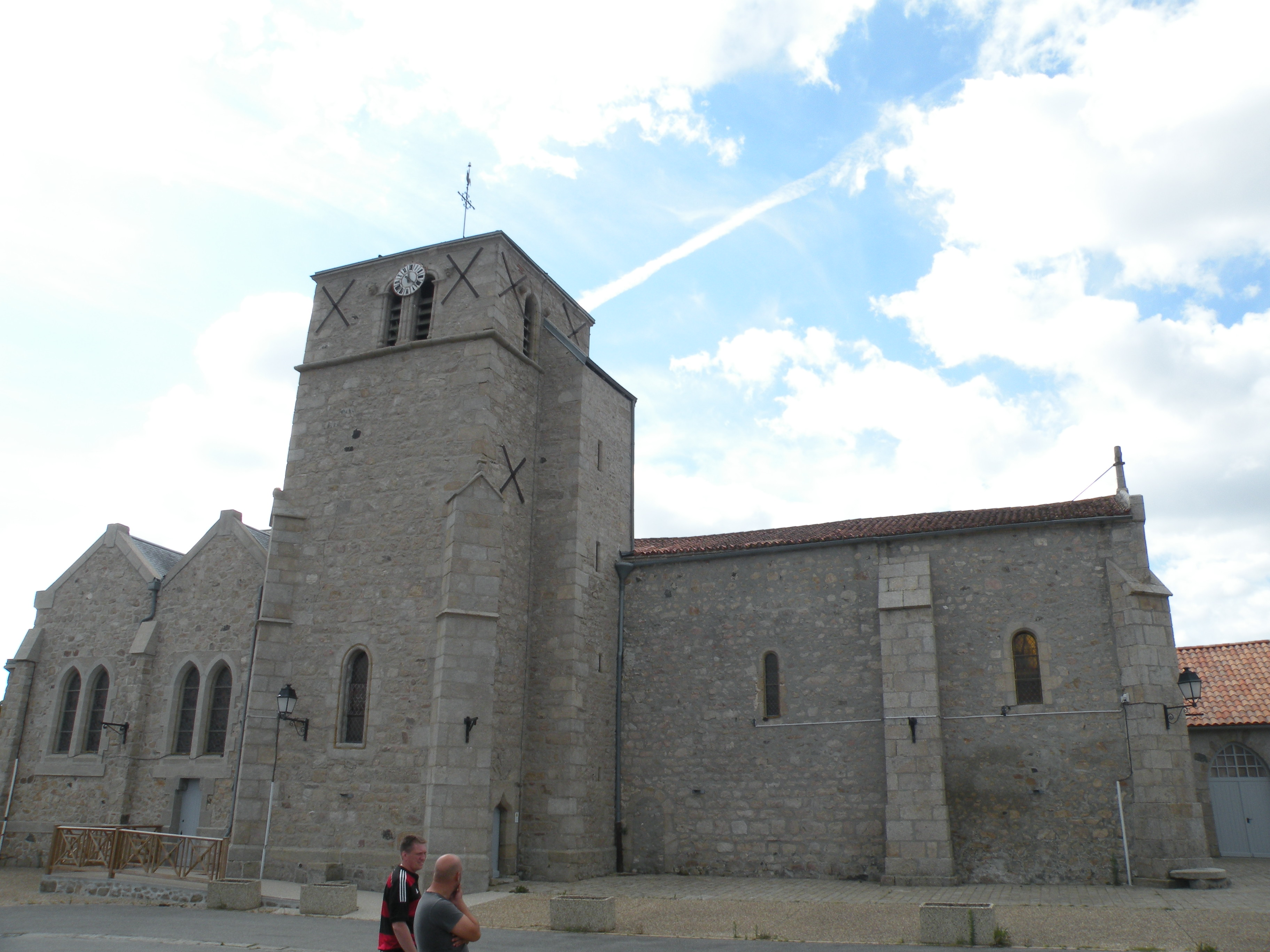 église Saint-Hilaire Clessé (Deux-Sèvres)